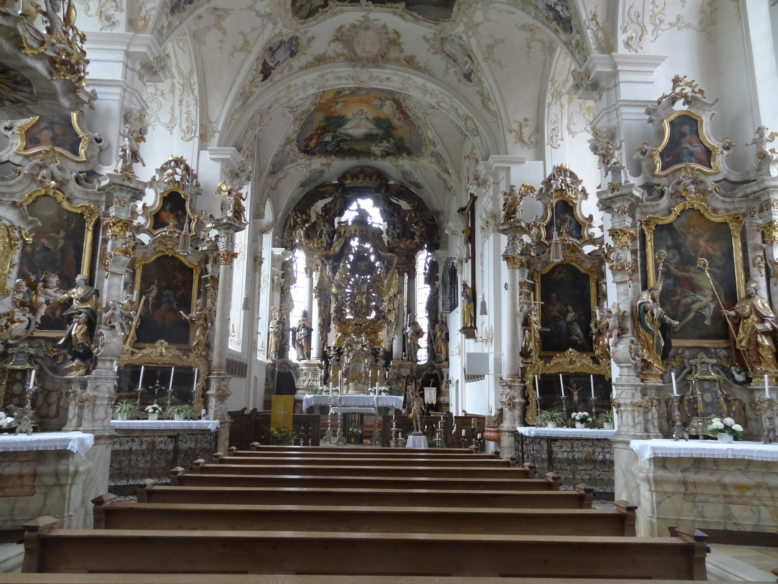 Innenraum der Wallfahrtskirche Mariä Himmelfahrt in Maria Thalheim (Gde. Fraunberg, Lkr. Erding)